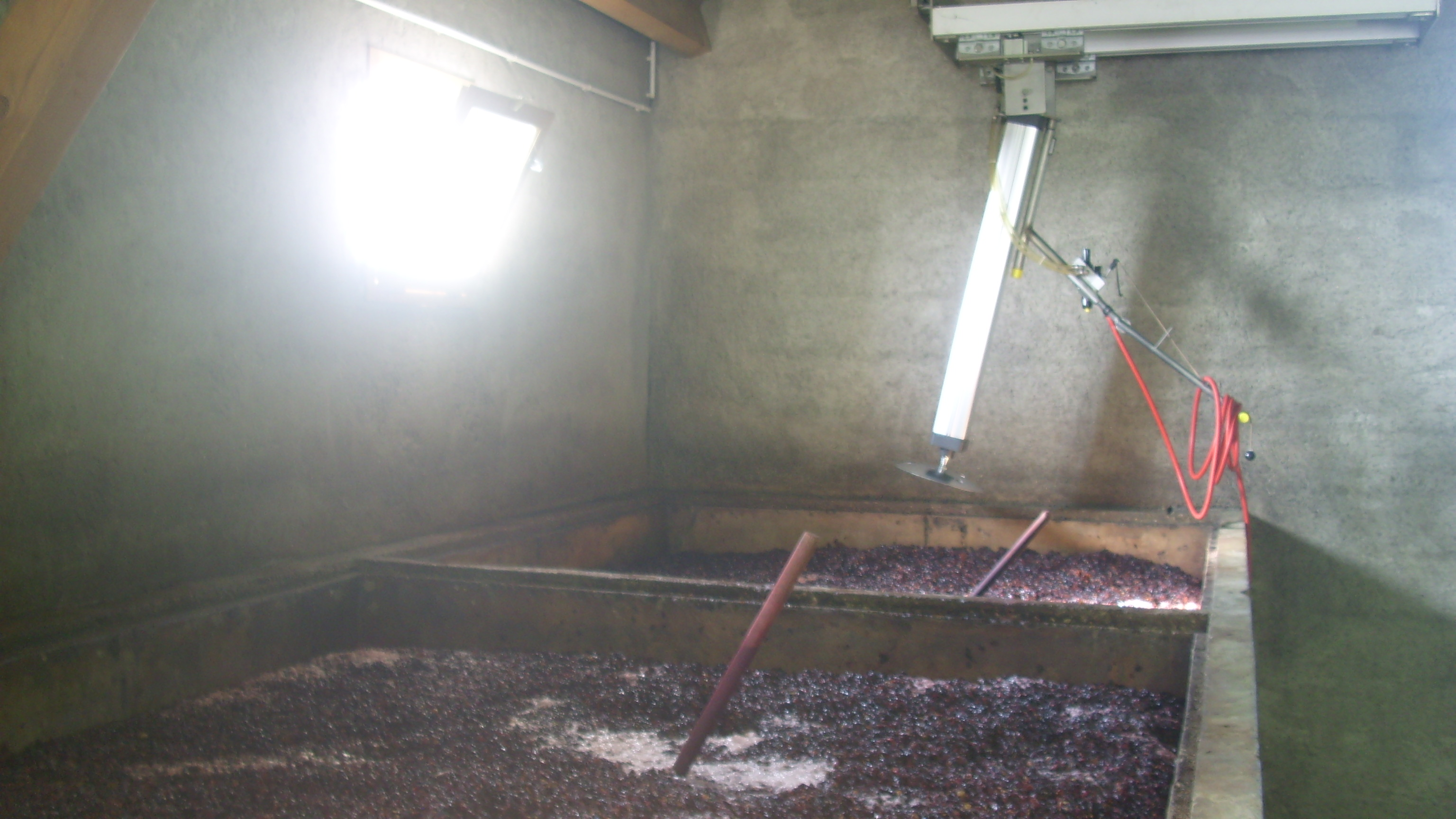 Pneumatisch unterstütztes Unterstossen des Tresterkuchens in einer französischen Weinkellerei in Saint-Martin-sous-Montaigu